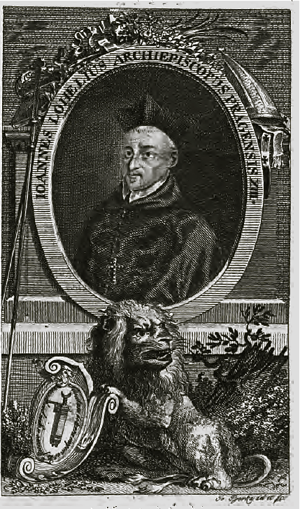 Johan Lohelius, Arcibiskup pražský (1612-1622)